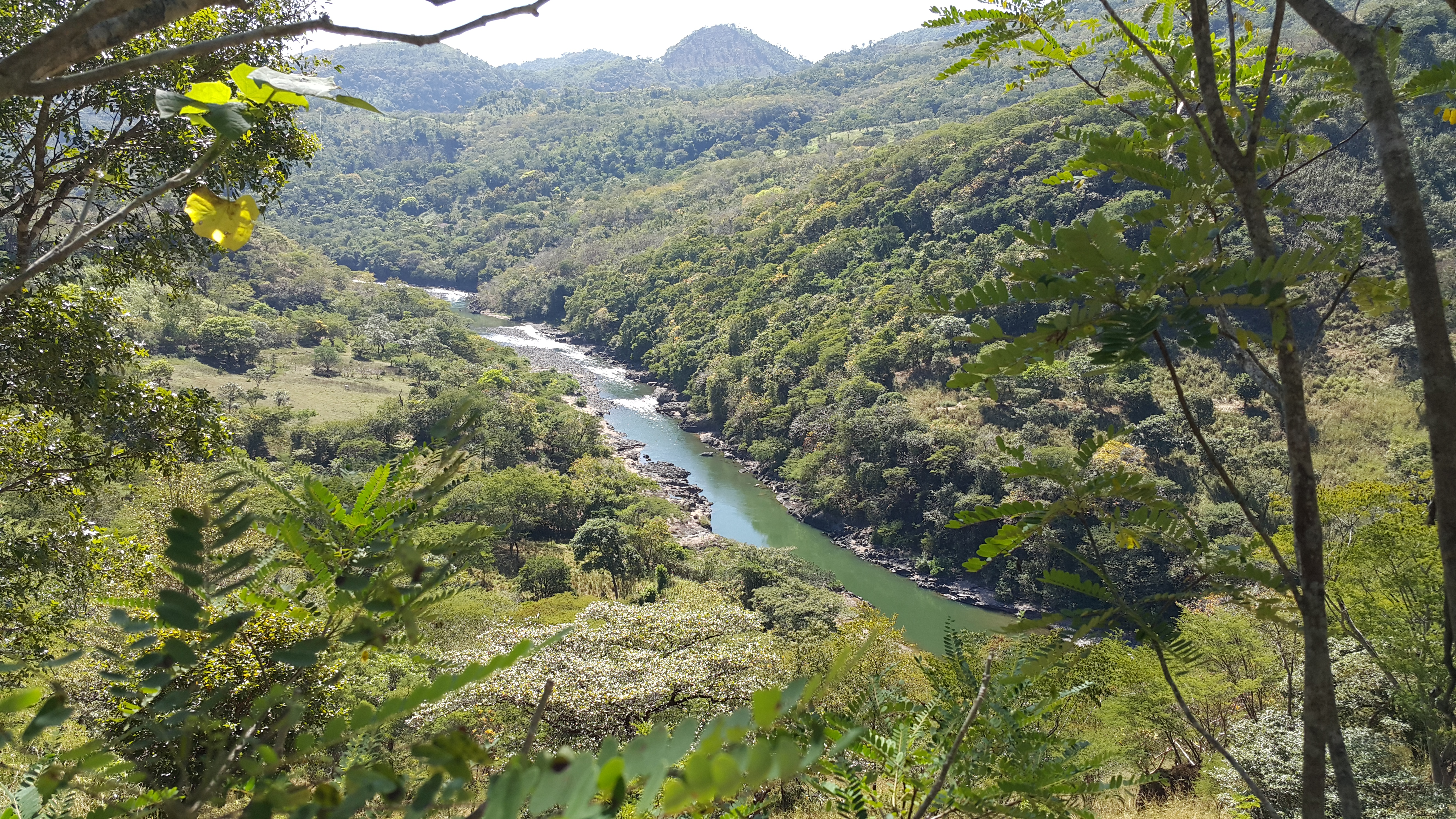 Panoramica río Torola.